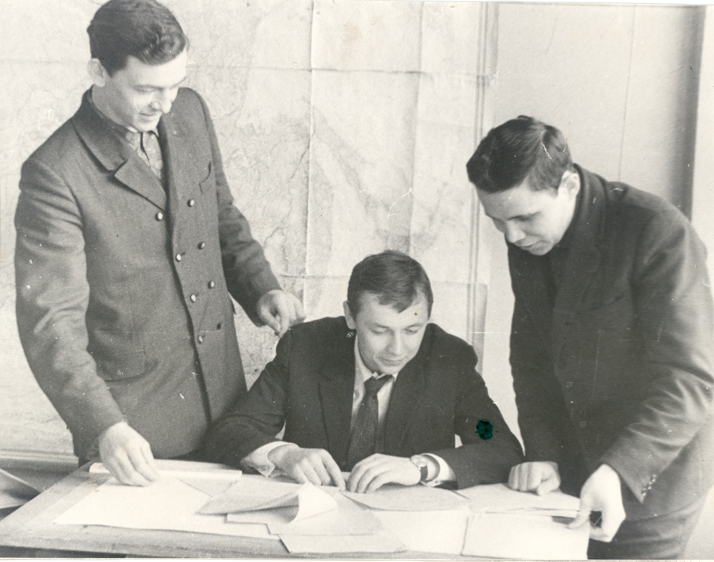 А. М. Шаммазов, будущий ректор УГНТУ, в первые годы преподавательской работы.